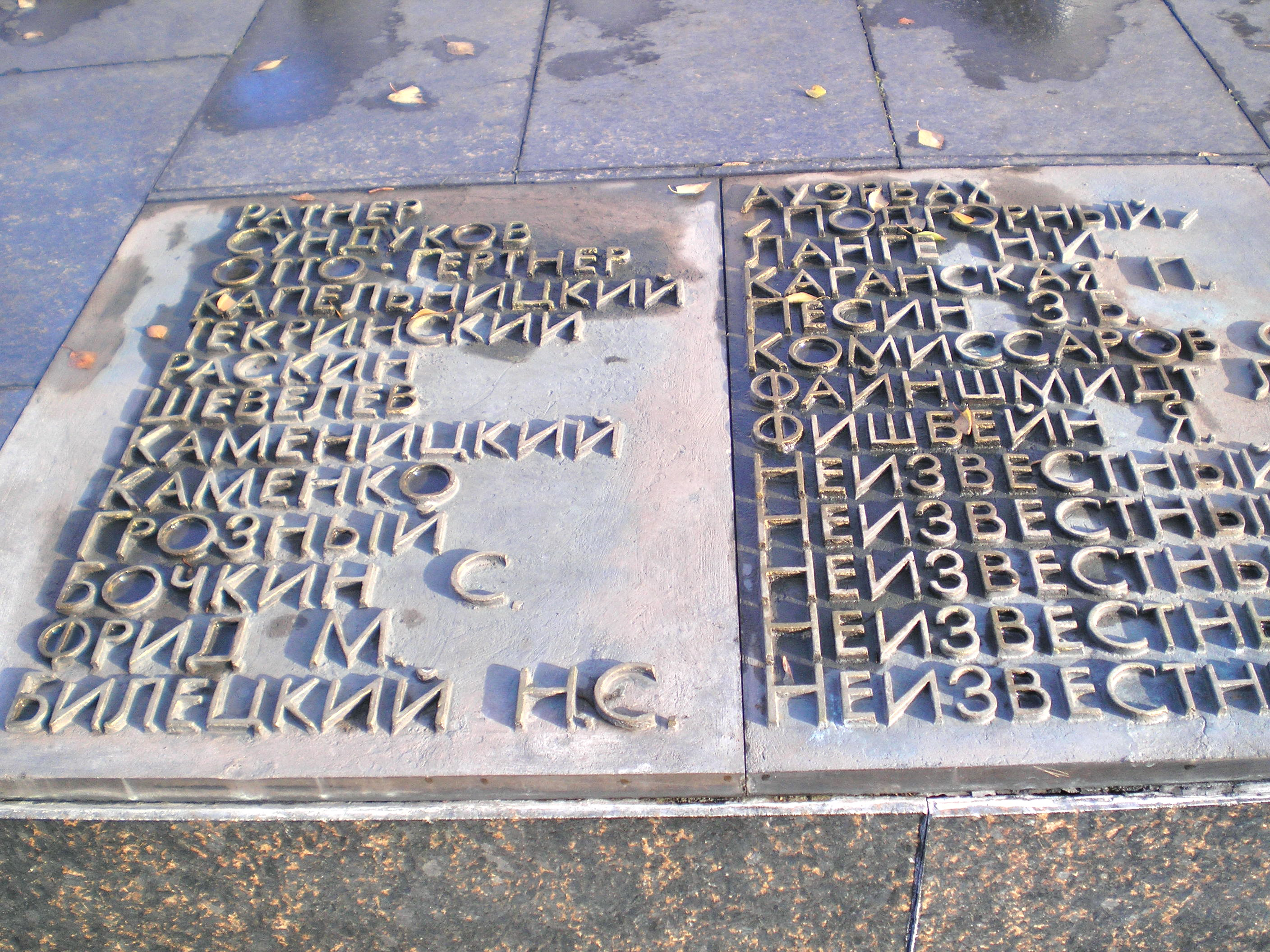 Мемориальная плита коммунарам-чекистам, погибшим во время восстания Стрекопытова в Гомеле